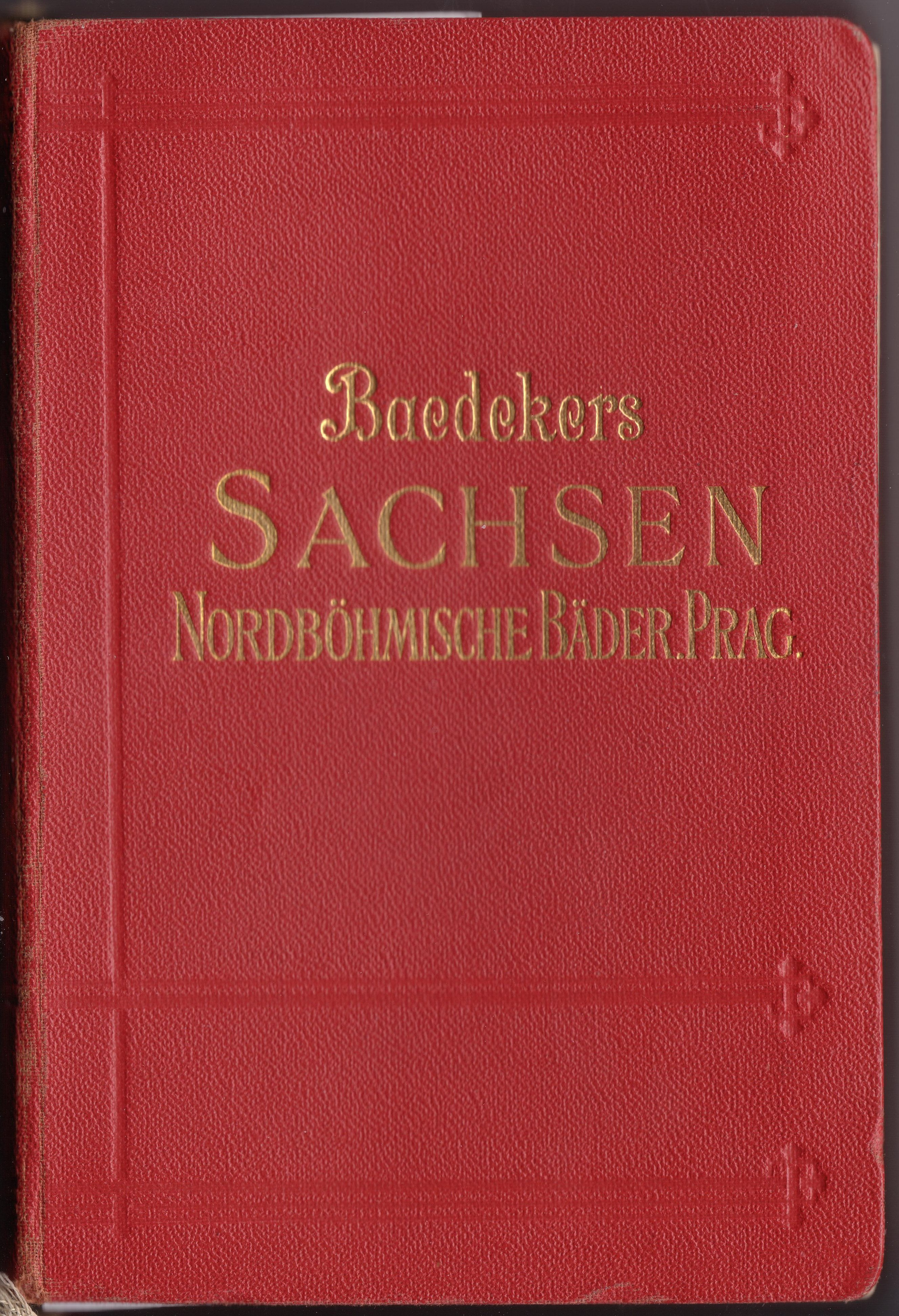 Baedekers, Sachsen, 2., 1928